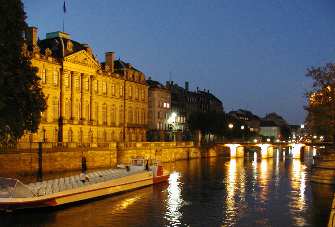 Straßburg